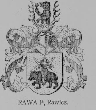 Rawicz